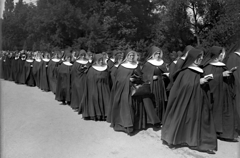 Der große Katholikentag in Magdeburg! Nonnen betend im Prozessionszuge.